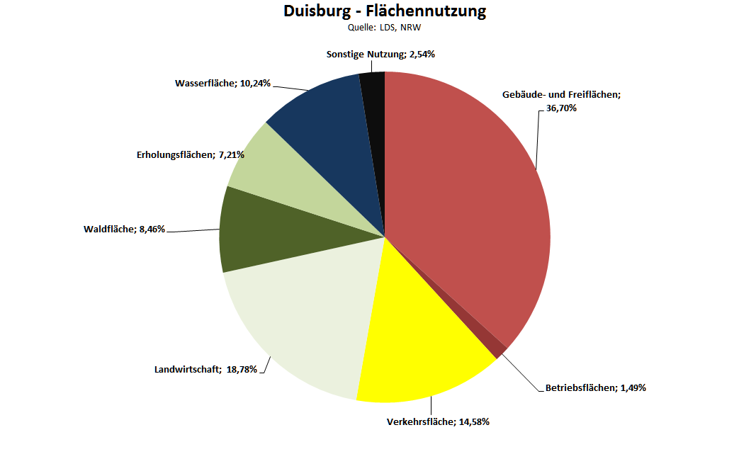 Nutzung der Katasterfläche der Stadt Duisburg